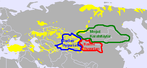 Uygurların bölünmesi